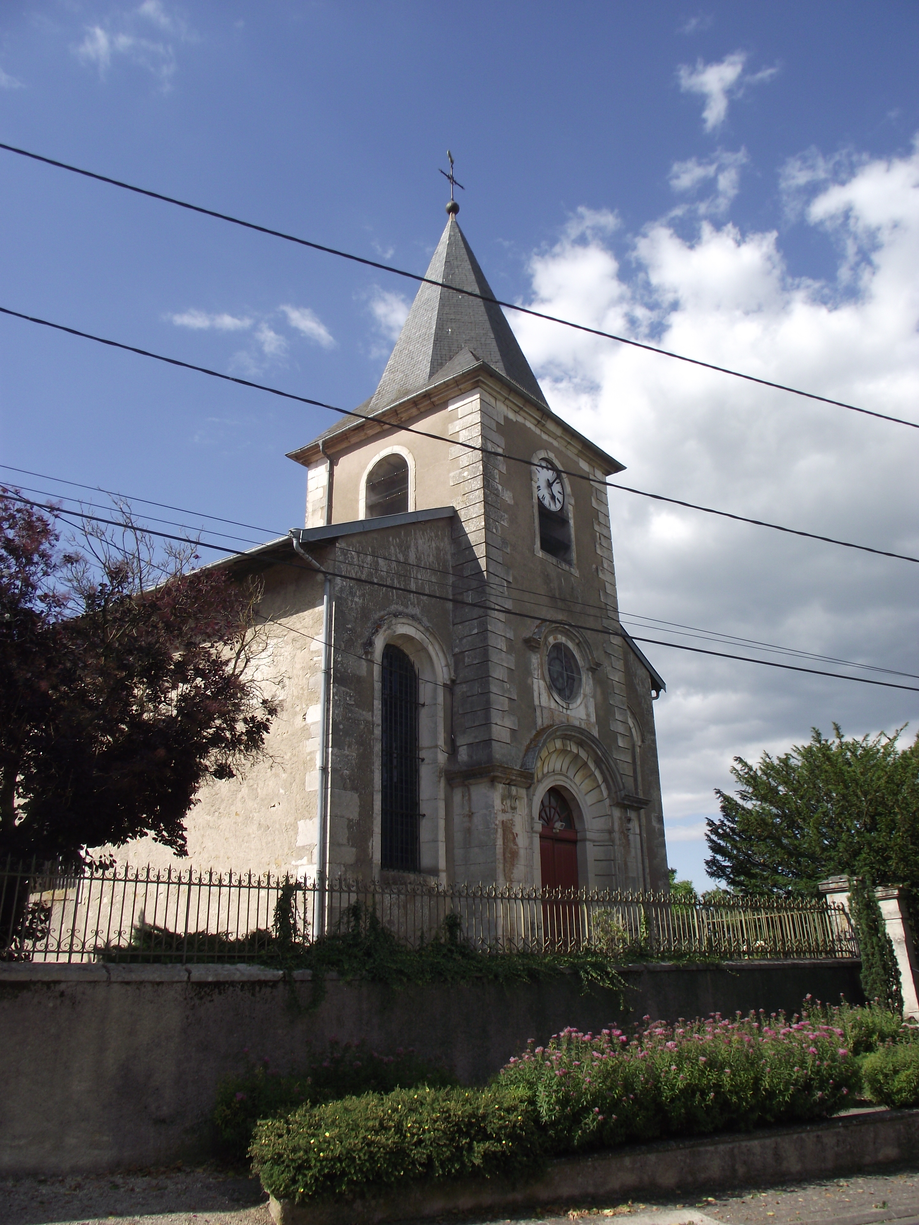 Église de Saulxures-les-Vannes